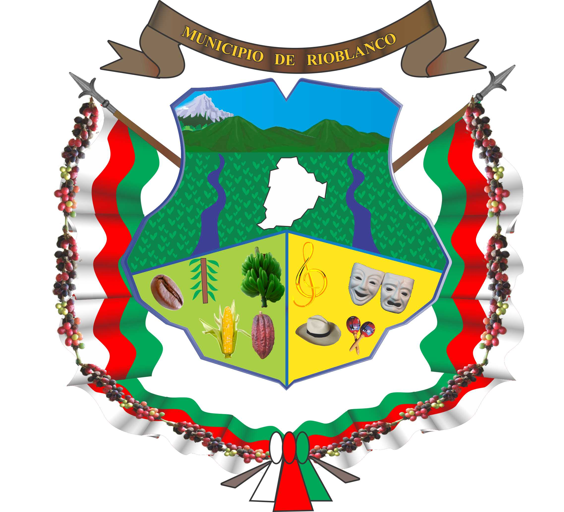 Escudo del Municipio de Rioblanco